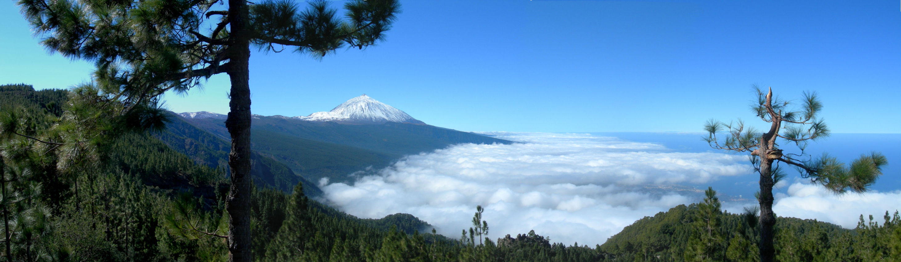 Panorámica del Teide, desde mirador, composición formada por cuatro fotos convertidas en una de formato panorámico (2923 x 853)